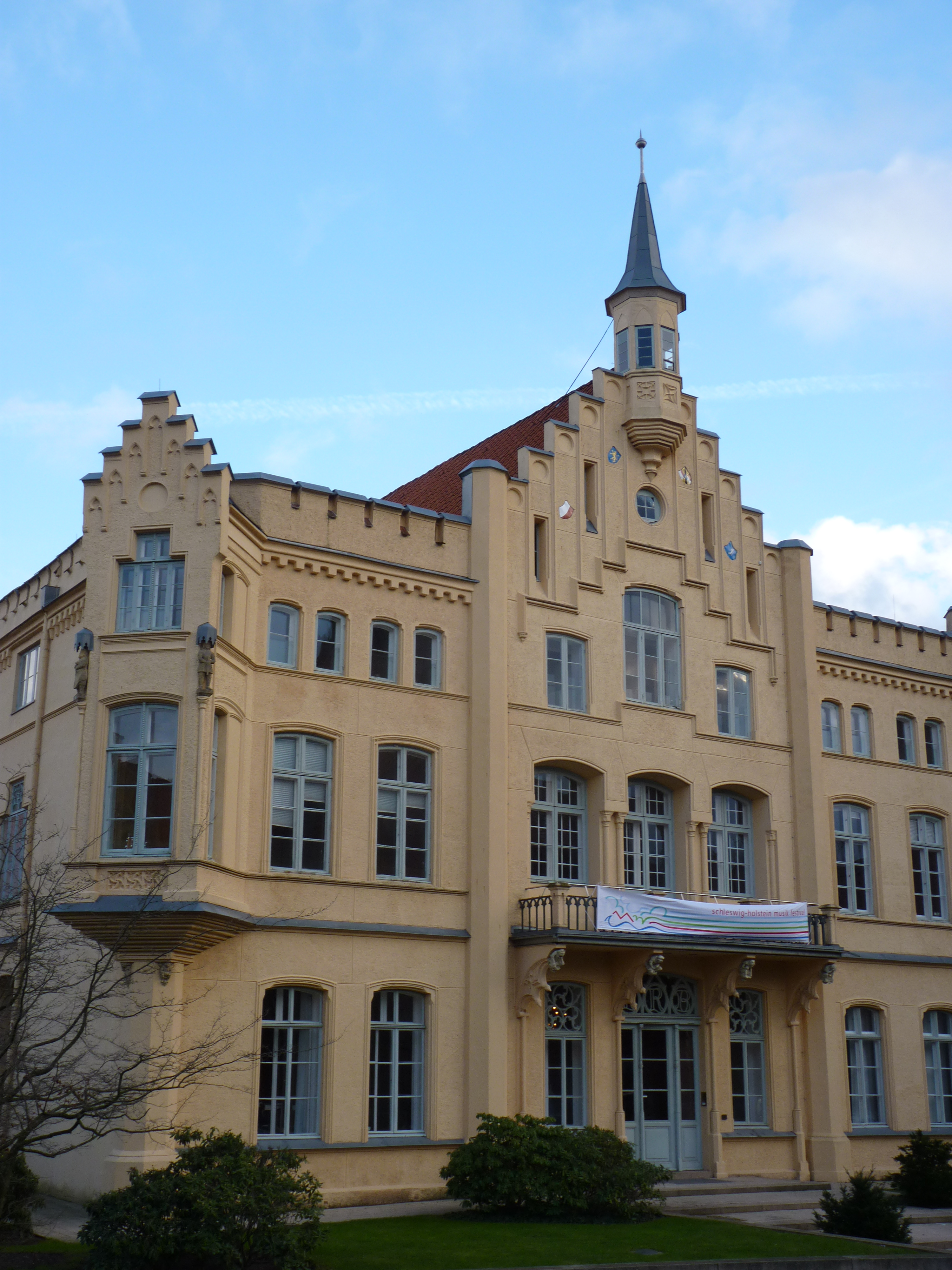 Palais Rantzau (Lübeck), Sitz des Schleswig-Holstein Musik Festival